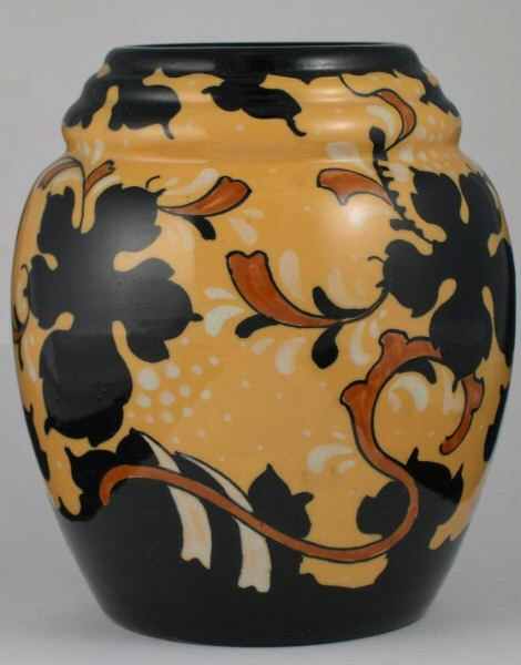 Regina